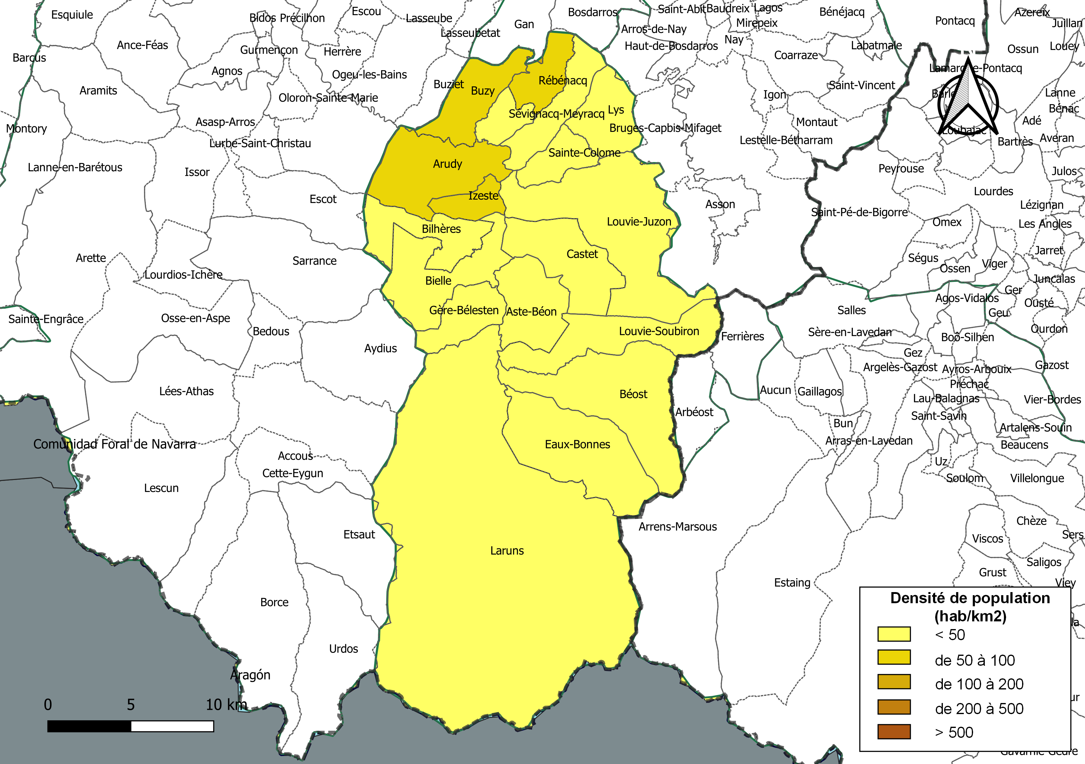 Carte des densités de population (millésimée 2016) des communes de la Communauté de communes de la Vallée d'Ossau, département des Pyrénées-Atlantiques, France. Composition au 1er janvier 2019.